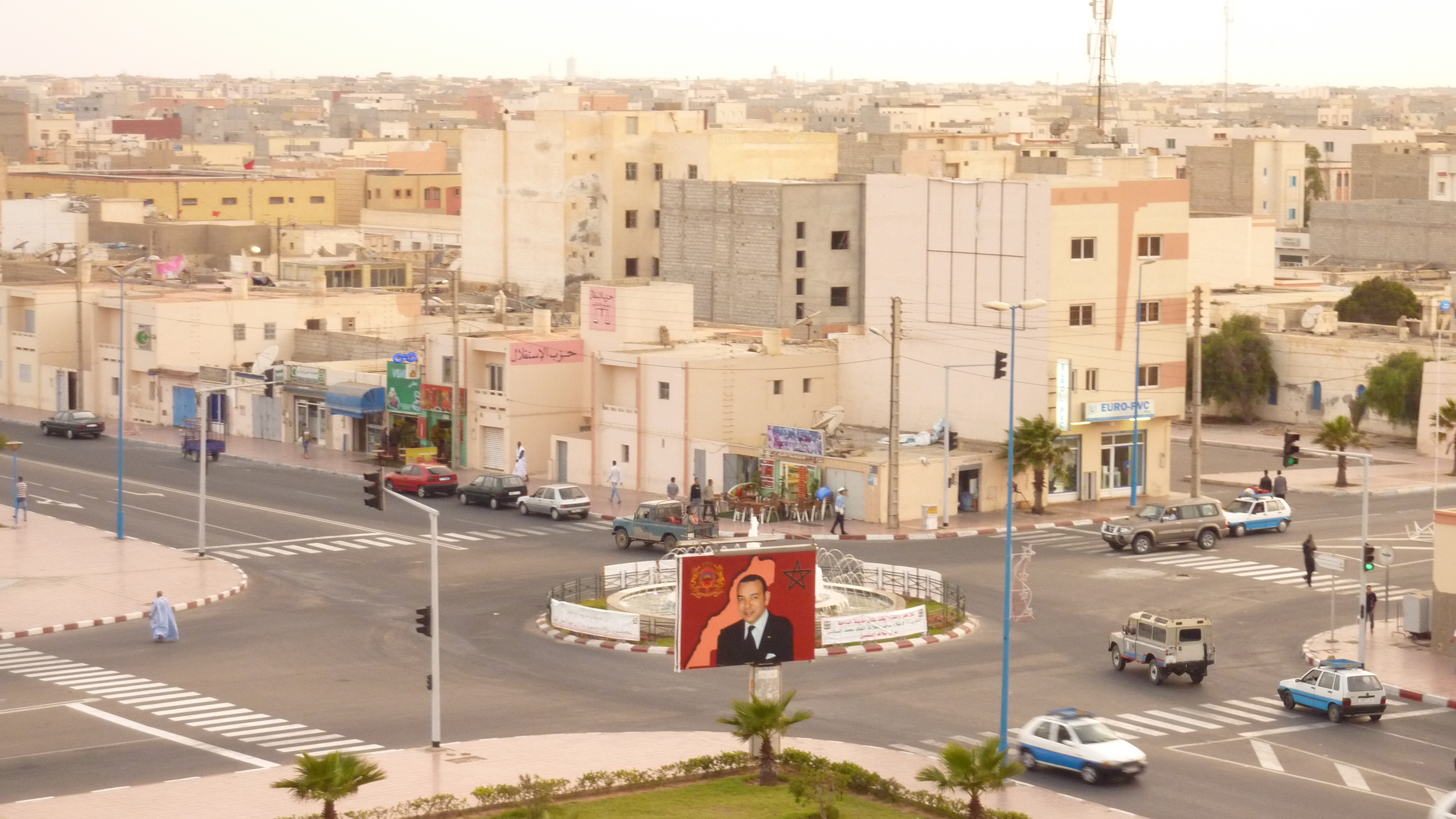 Dakhla, Western Sahara